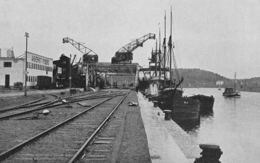 Hammarbyhamnens norra kaj 1929